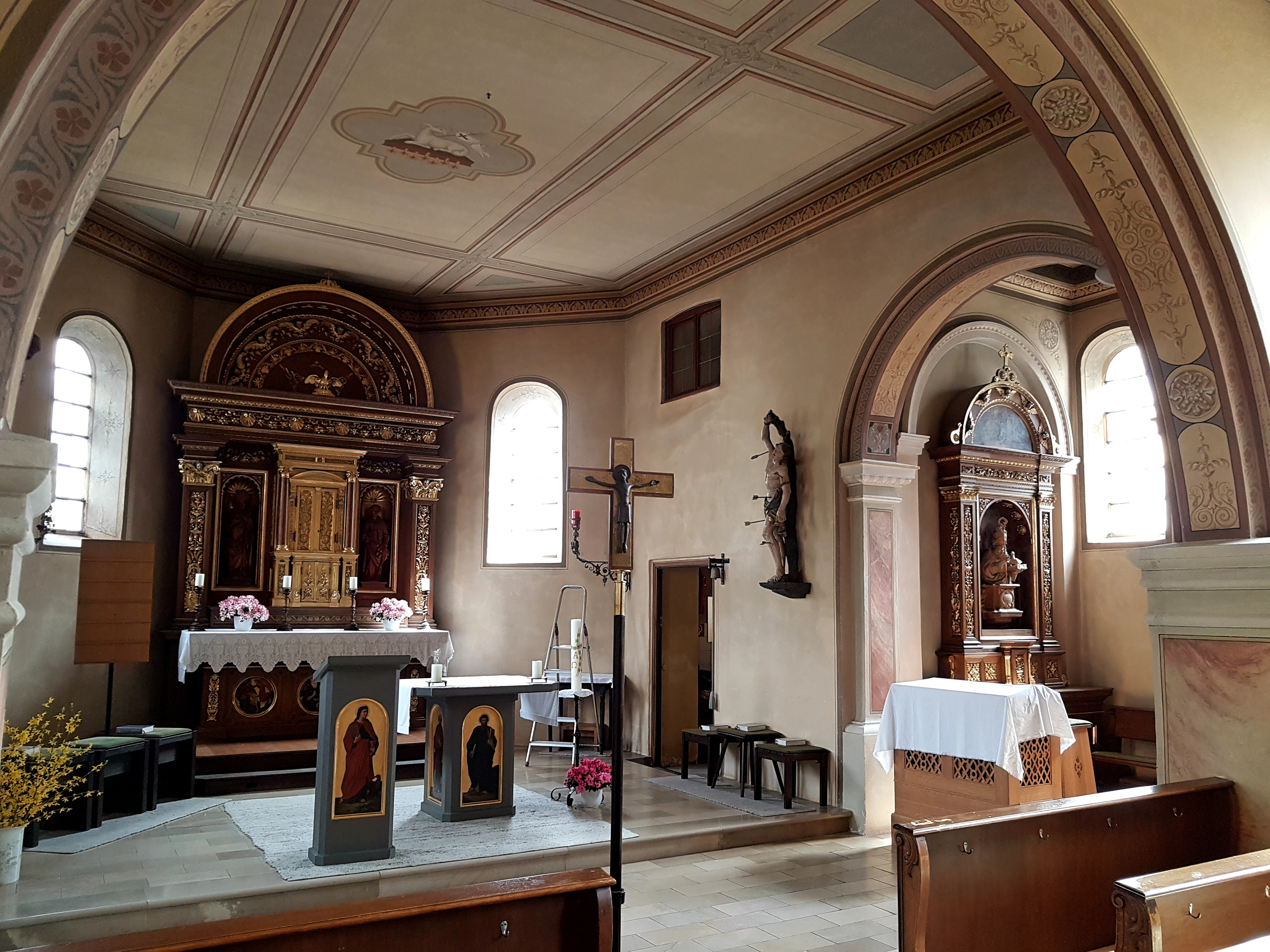 Unterschleissheim, alte Expositurkirche St. Ulrich, Chor mit Hochaltar (1893) und rechter Seitenkapelle.